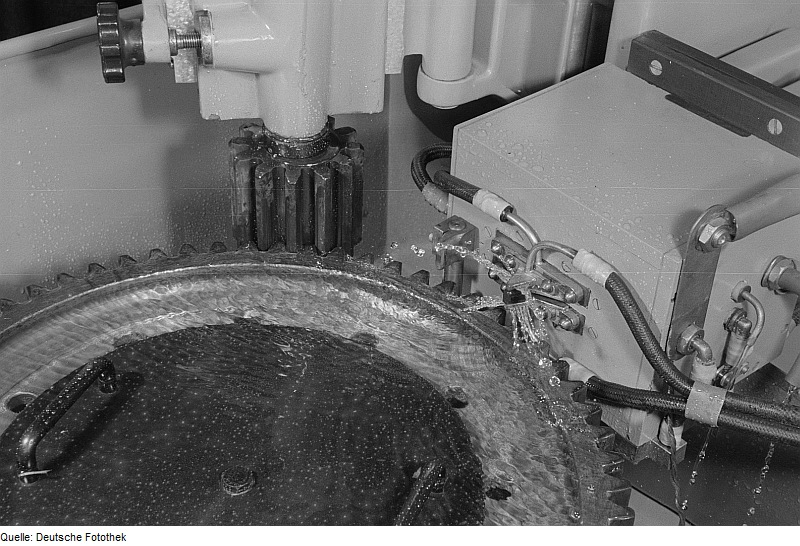 Original image description from the Deutsche FotothekDetail einer Werkzeugmaschine